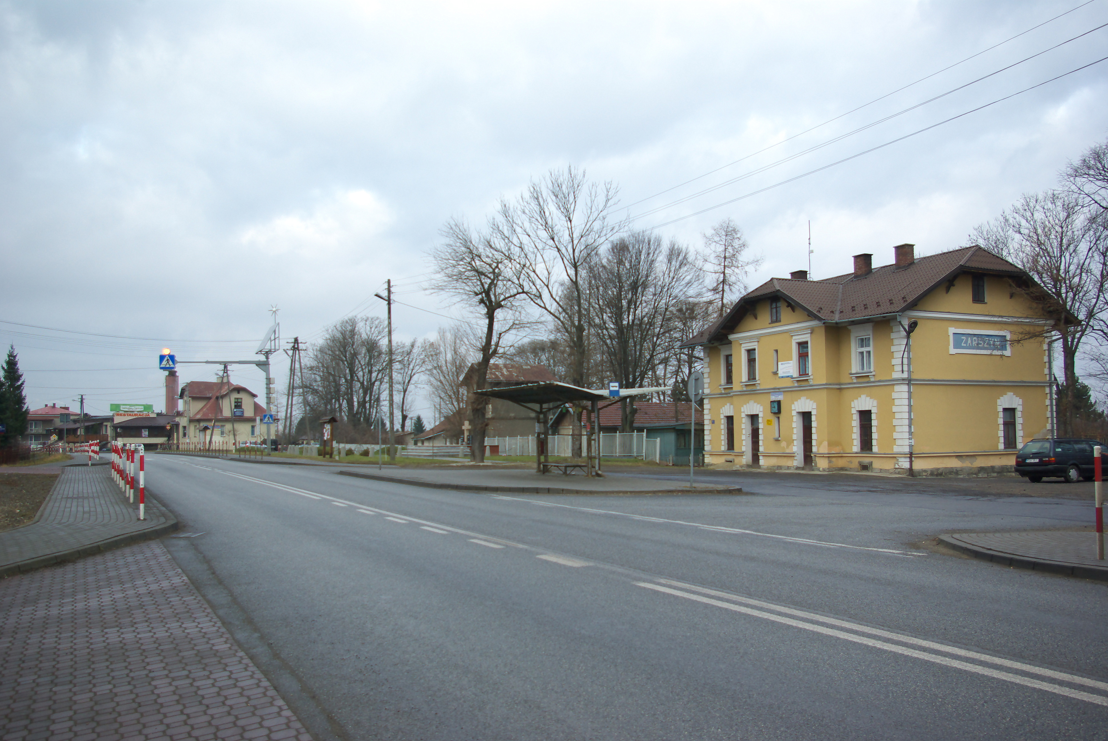 Ulica Bieszczadzka w Zarszynie, Stacja kolejowa w Zarszynie